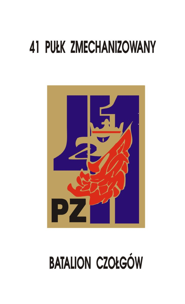 plakat symbolizujący kutywowanie tradycji 41pp przez 1 batalion zmech